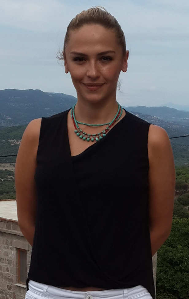 Sinem Öztürk Eylül 2015